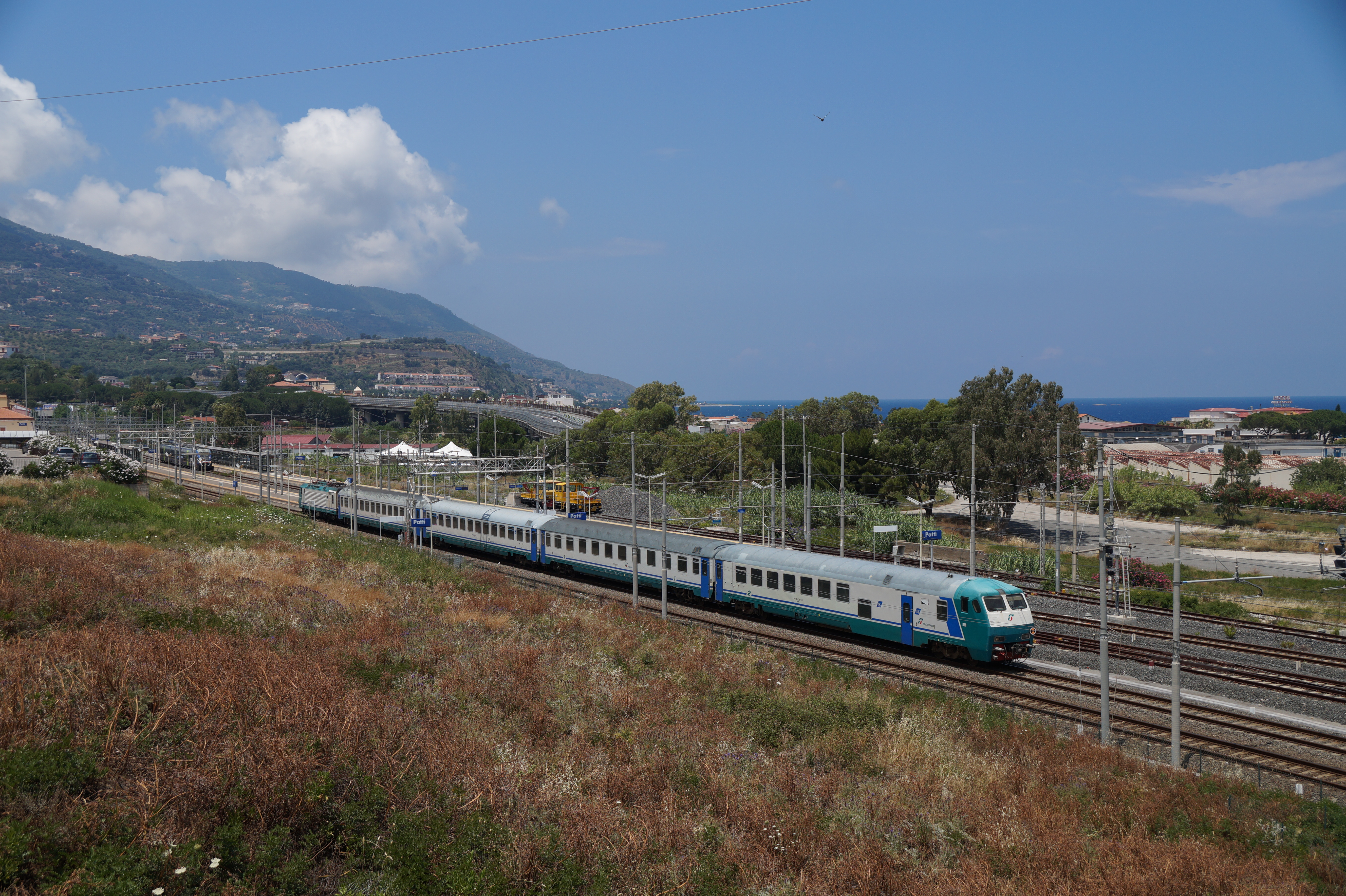 Regionalzug im Bahnhof Patti-S Piero Patti